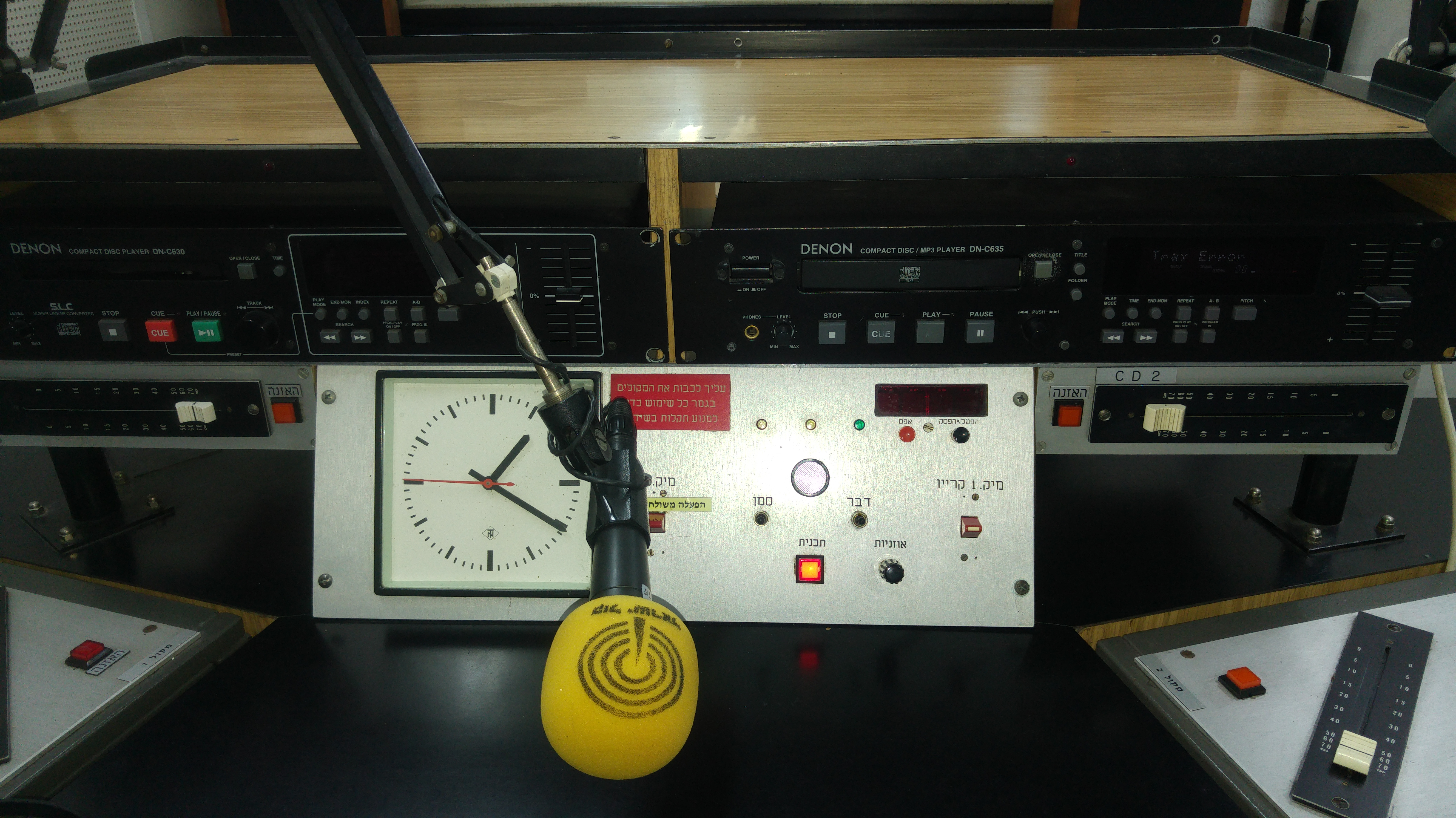 מתחם רשות השידור בתל אביב, ליד הקריה ומתחם שרונה.